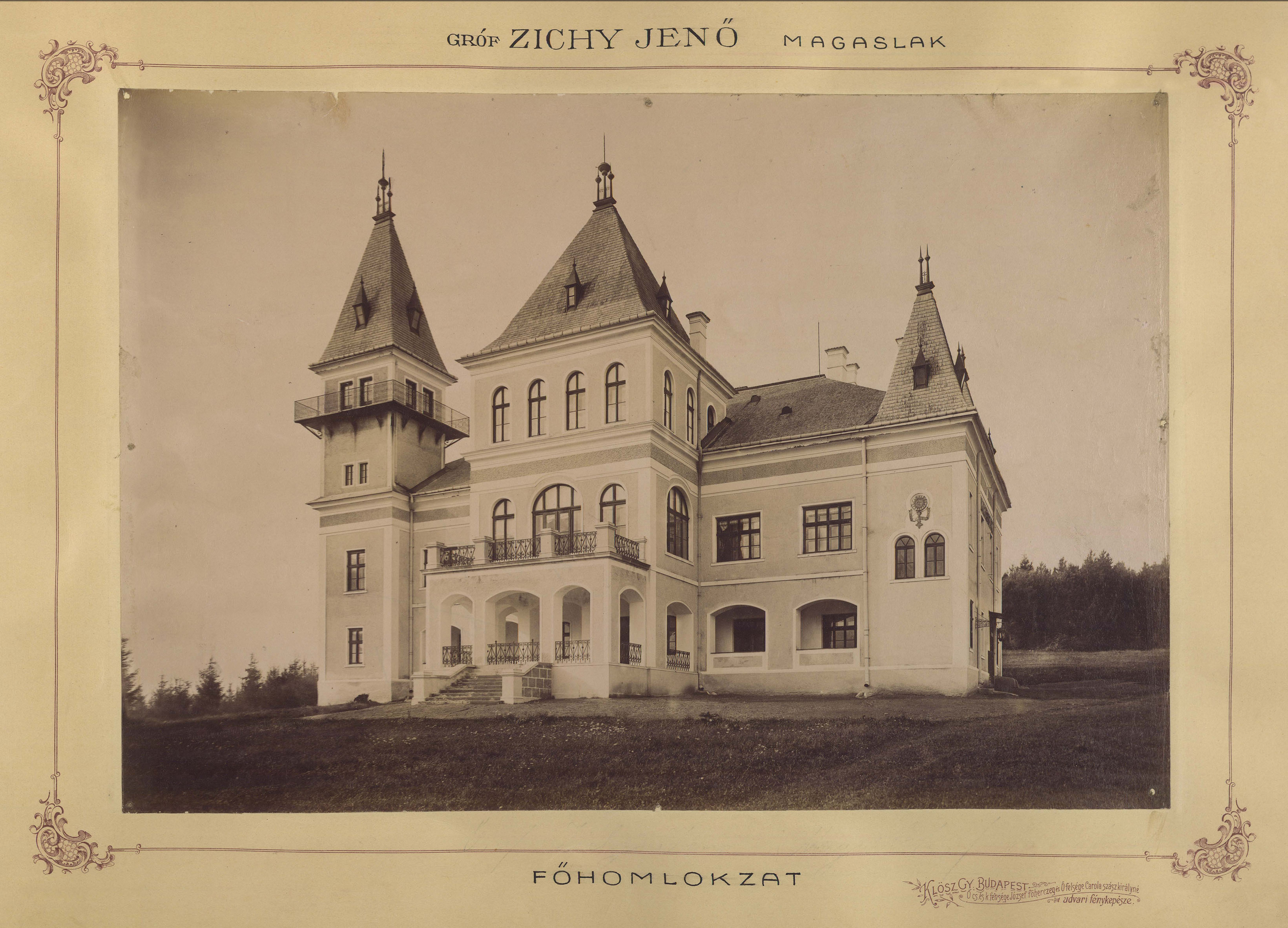 Zichy Jenő gróf vadászkastélyának főhomlokzata. A felvétel 1895-1899 között készült. A kép forrását kérjük így adja meg: Fortepan / Budapest Főváros Levéltára. Levéltári jelzet: HU.BFL.XV.19.d.1.11.195 Location: Slovakia, Vysoká (okres Banská Štiavnica)